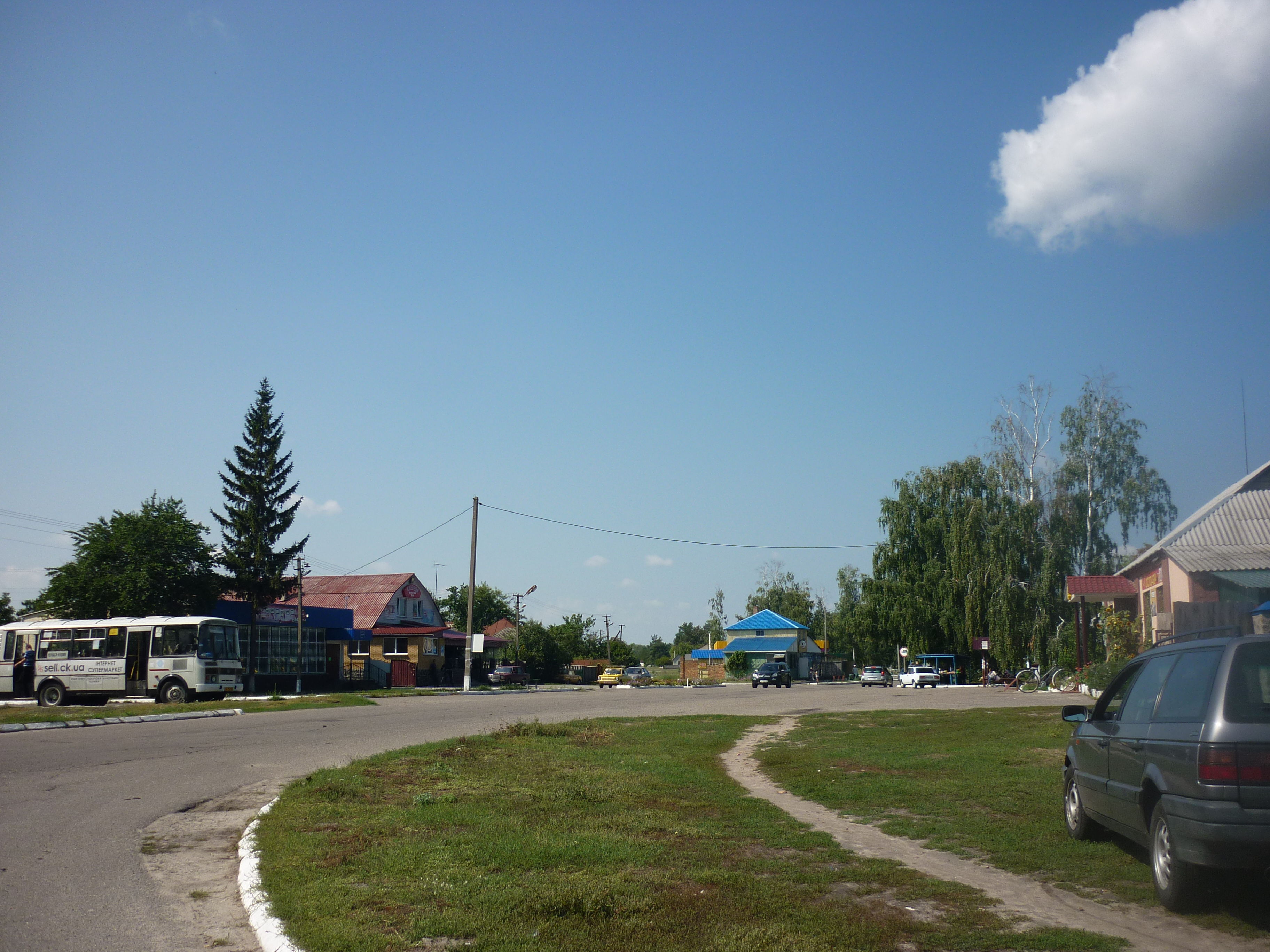 Центра села Будище Черкаського району